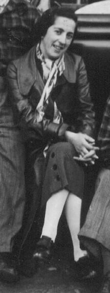 Maria Etxaberen gerra aurreko argazkia